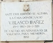 Placa en el lugar de nacimiento de Vicente Blasco Ibáñez, en Valencia